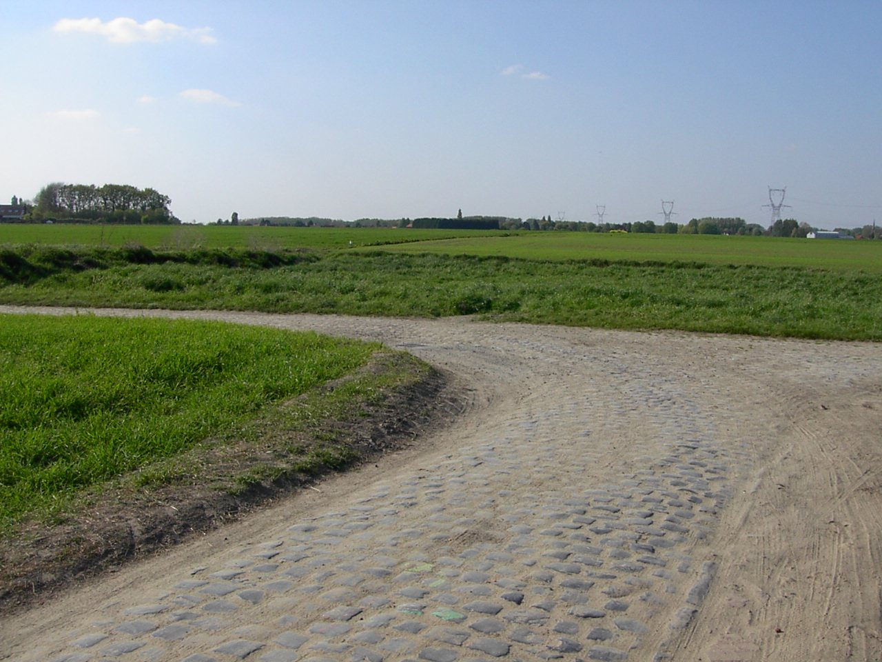 Secteur pavé de Mons-en-Pévèle